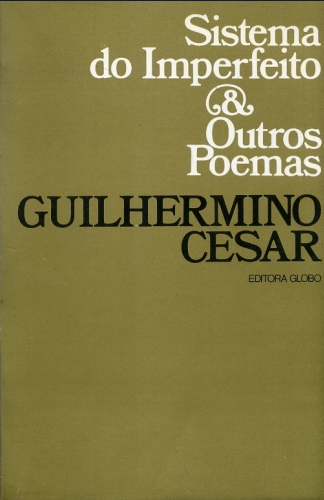 Capa do livro Sistema do Imperfeito e Outros Poemas de Guilhermino César